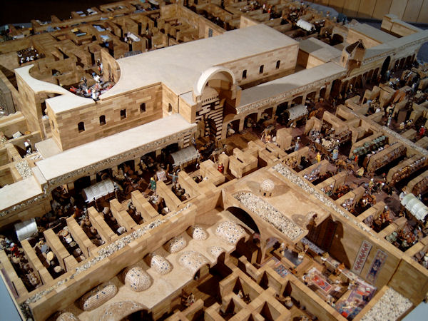 Modell 1:25, Der Basar von Aleppo